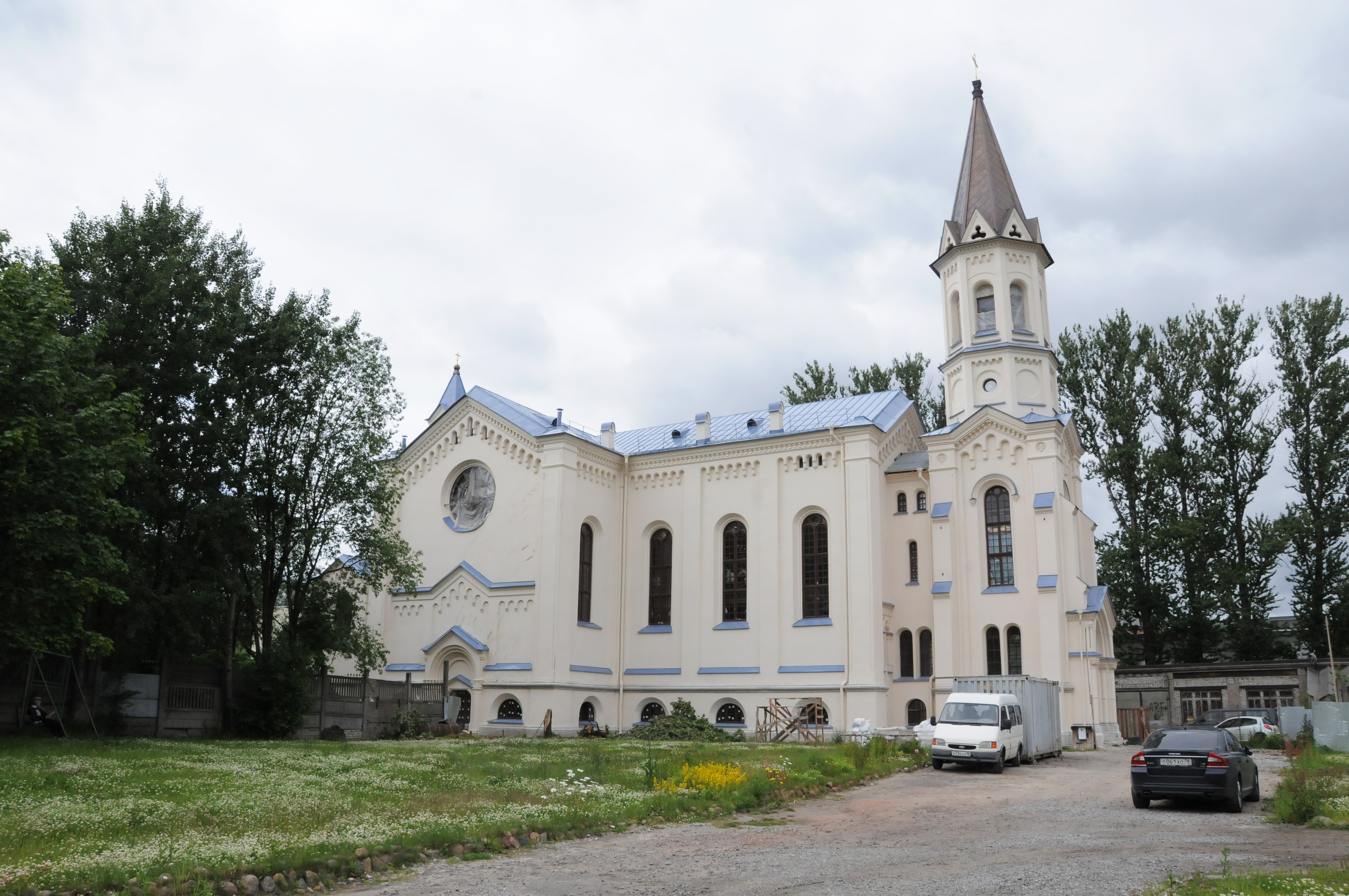 Действующий католический храм Посещения святой девой Марией Елизаветы, Санкт-Петербург, Минеральная ул., вид с юго-восточной стороны, июль 2017.